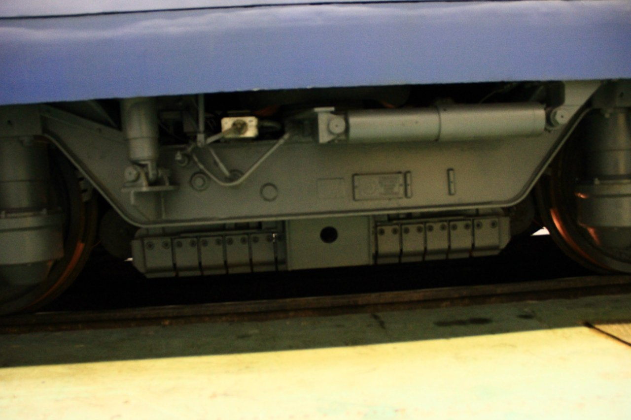 Магнитно-рельсовый тормоз ЭС250 "Сокол".